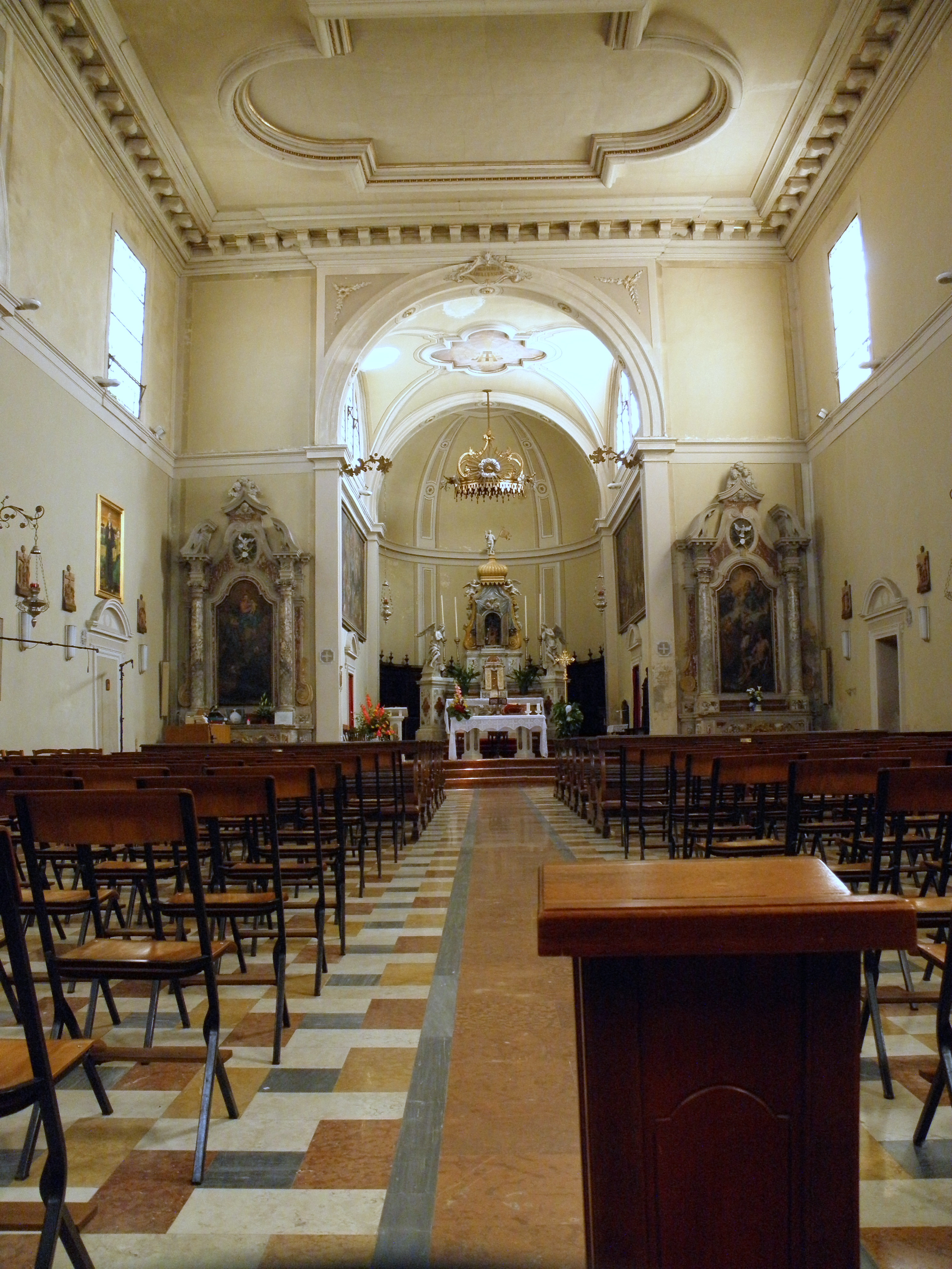 Gavello: l'interno della chiesa della Beata Vergine delle Grazie.